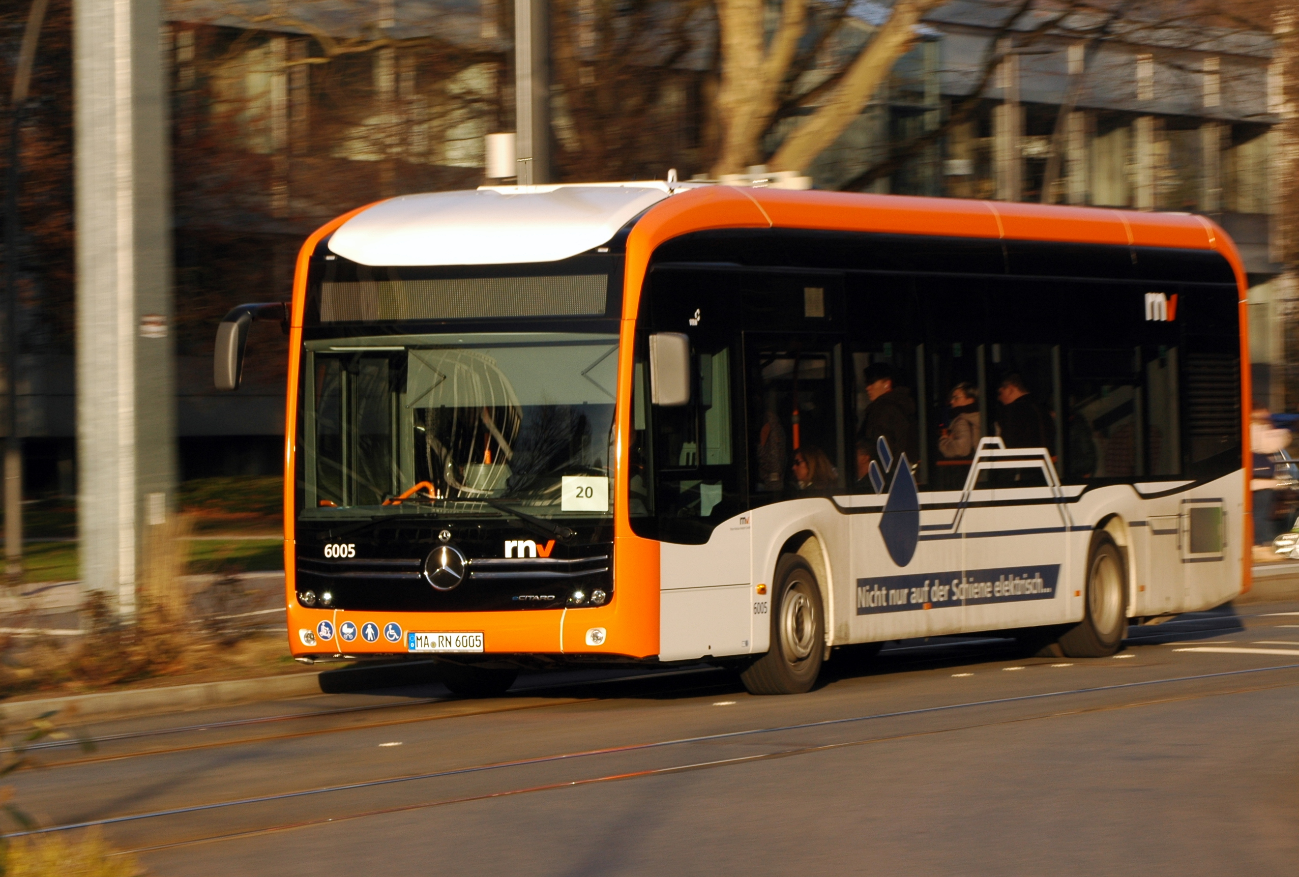 Mercedes-Benz eCitaro in Heidelberg